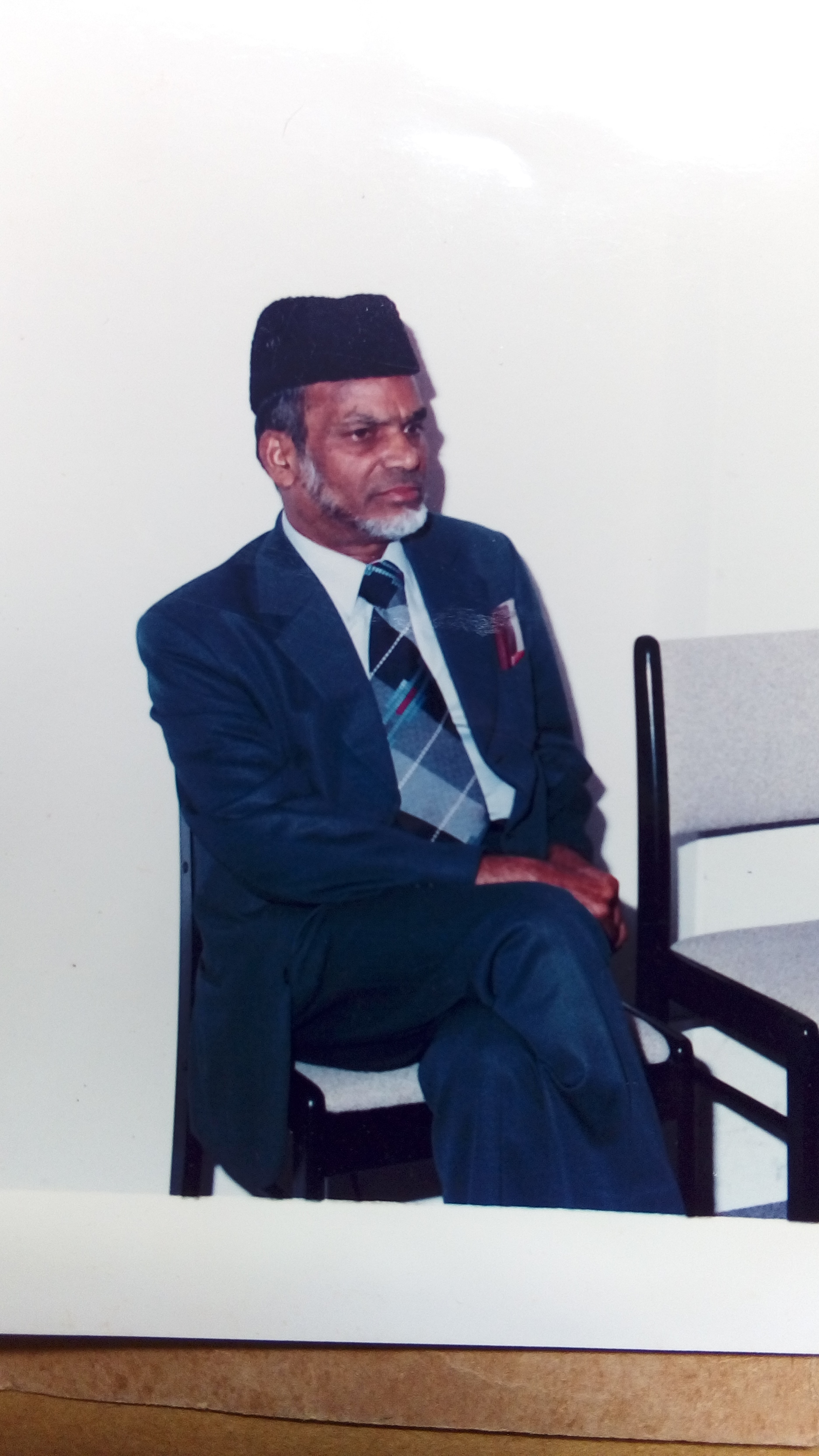 அவர்கள்